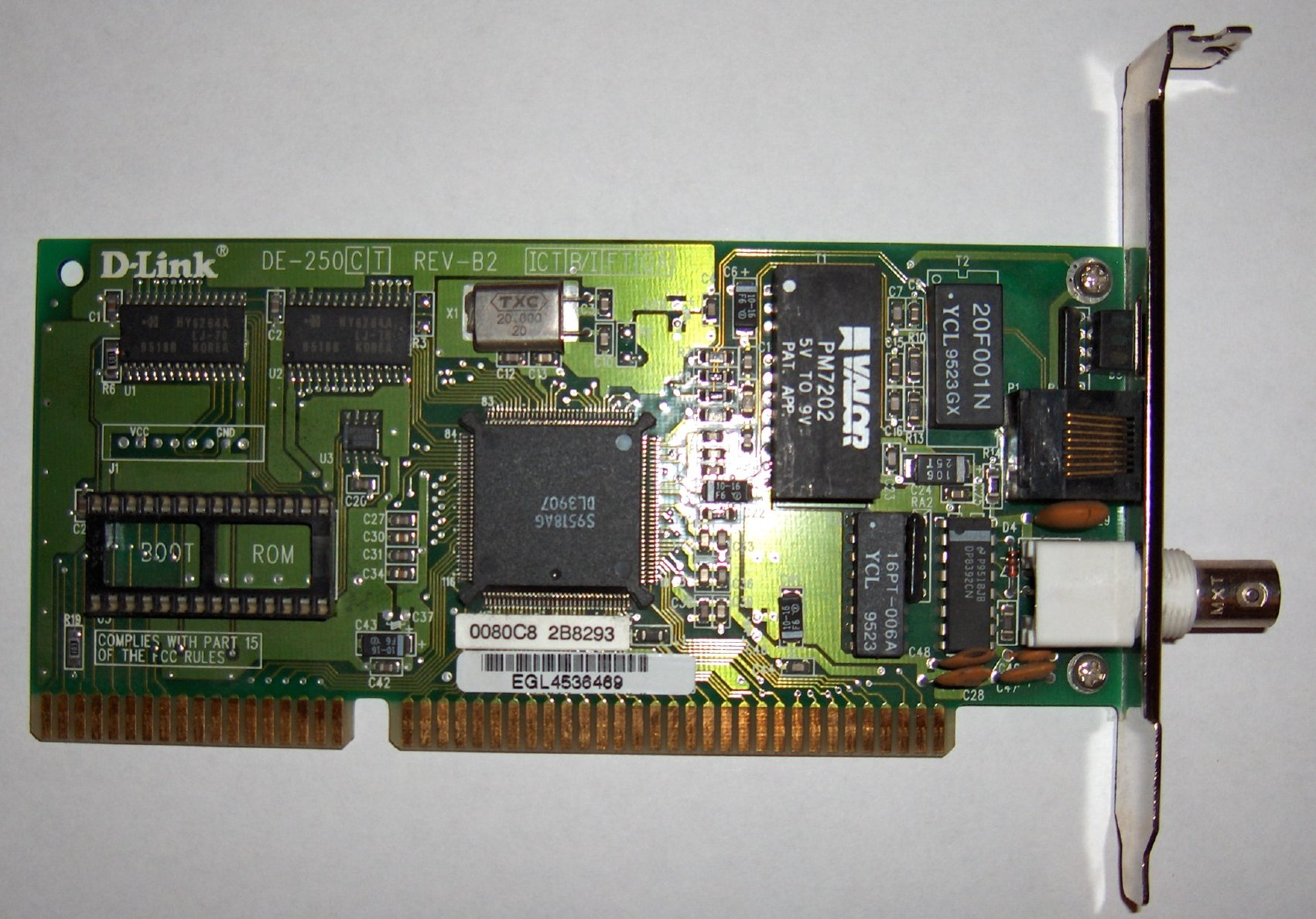 Tarjeta de red ISA D-Link E-250 CT (Coaxial/base T) a 10MB/s Foto tomada por Jorge González. Tarjeta de red ISA